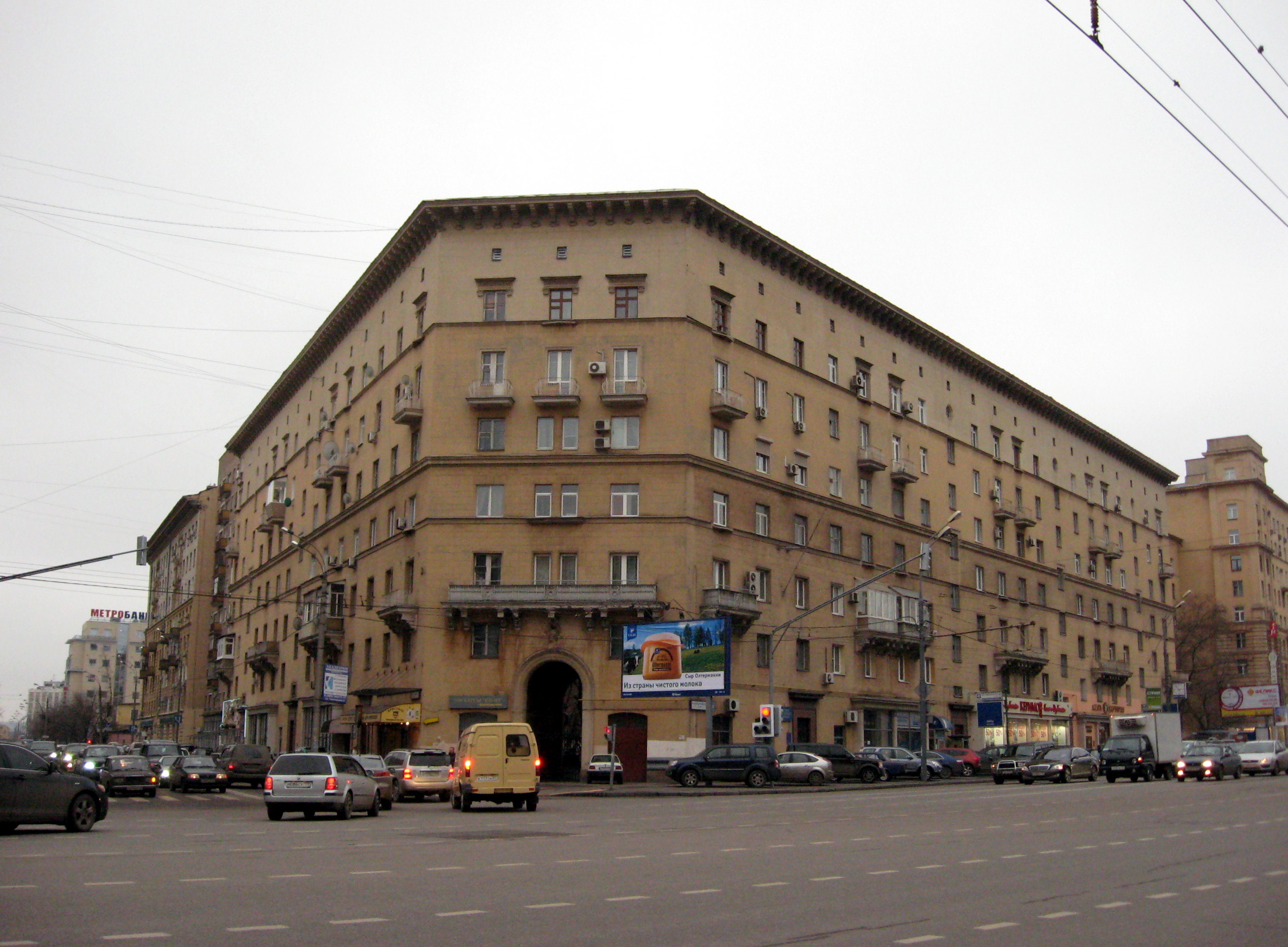 Дом 7/2 по Большой Дорогомиловской улице, Москва. Угол с улицей Можайский Вал